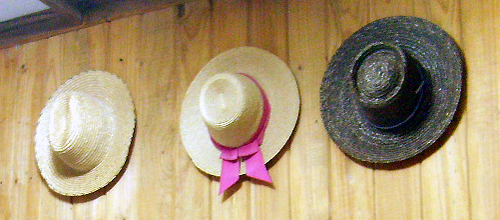 Las chupallas son sombreros artesanales hechos de paja que utilizan los huasos en Chile. This image (or all images in this category/page) is very small, unfixably too light/dark, or may not adequately illustrate the subject of the picture. If a higher-quality image is available please consider replacing this one; otherwise, a replacement under a free license should be found or provided. Please see Category:Image cleanup templates for templates used to mark images that only need a clean-up. For more help, see Commons:Media for cleanup#Low quality pictures.